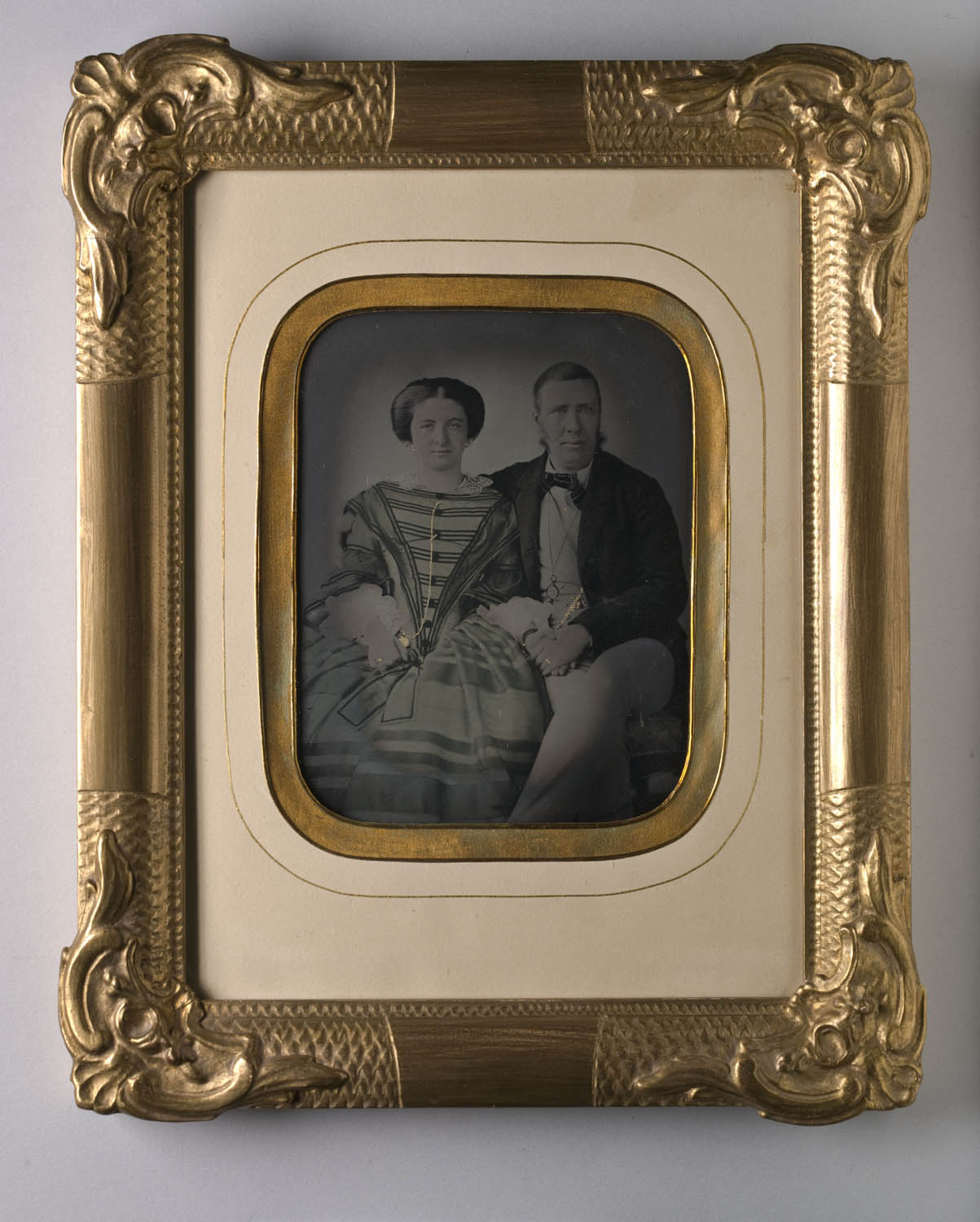 Depicted person: Sven Alarik Bergström, FÖRSTE REVISOR; Flore Josephine Bergström